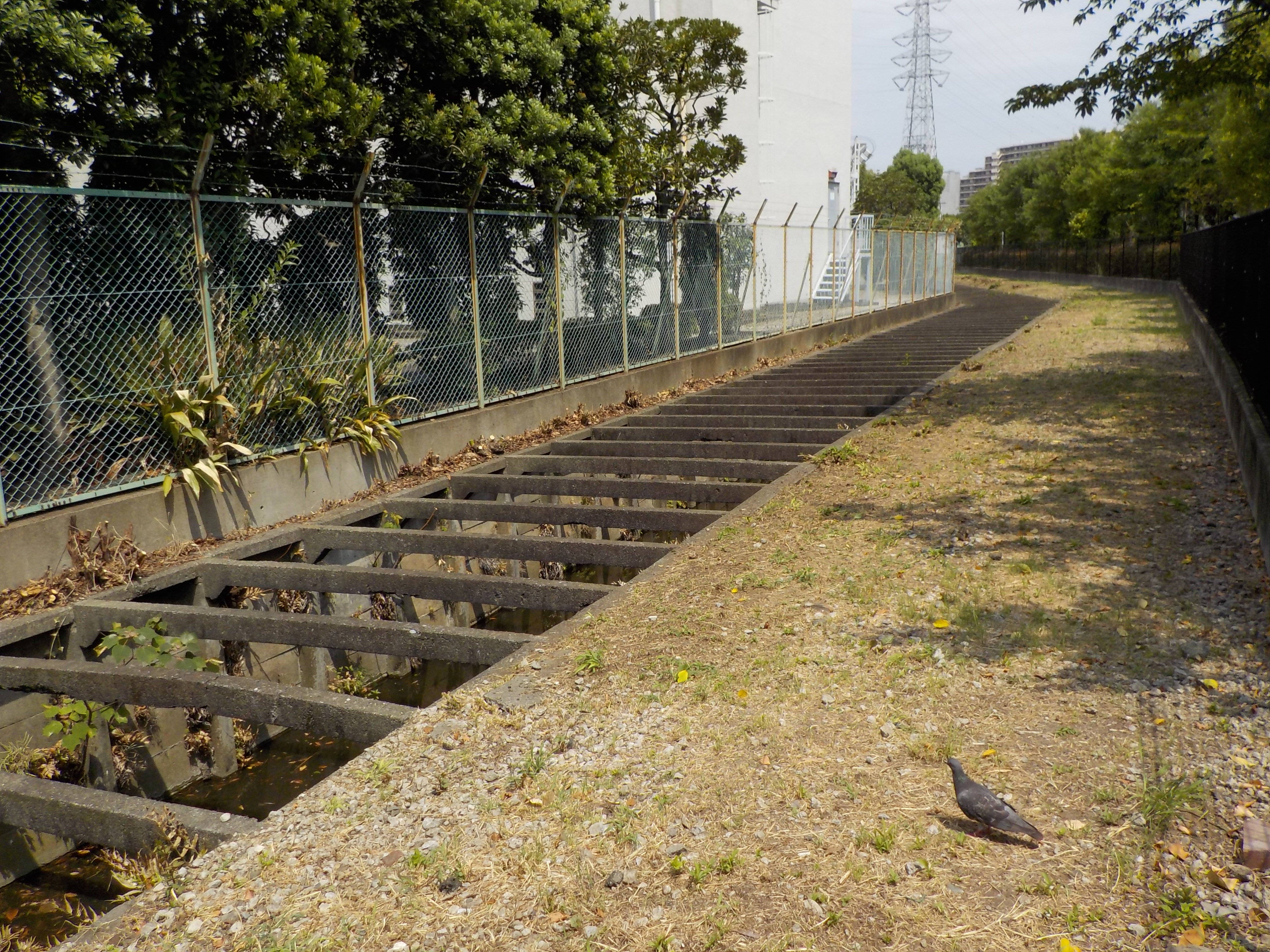 稲付川開渠部分（北区神谷三丁目８付近）を北本通側から望む。